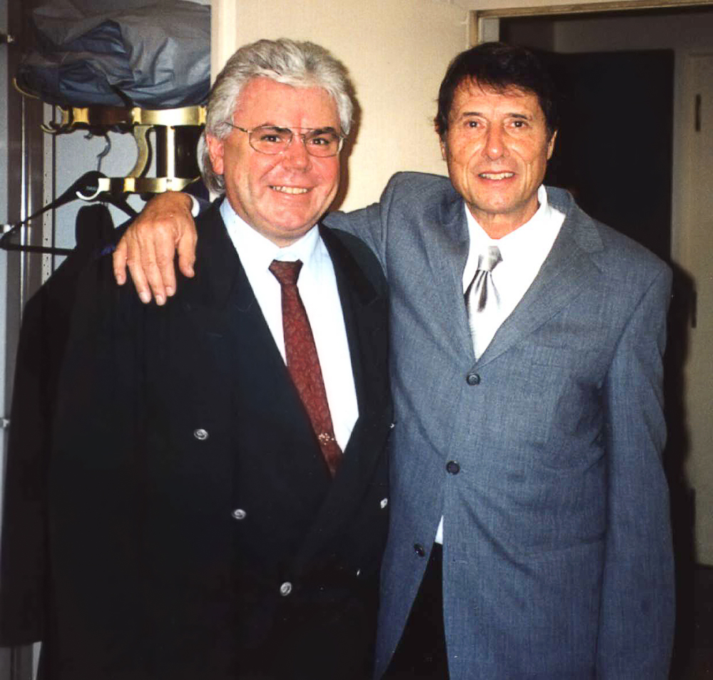 Eine selbstfotografierte von Manfred Mühlbeyer und Udo Jürgens